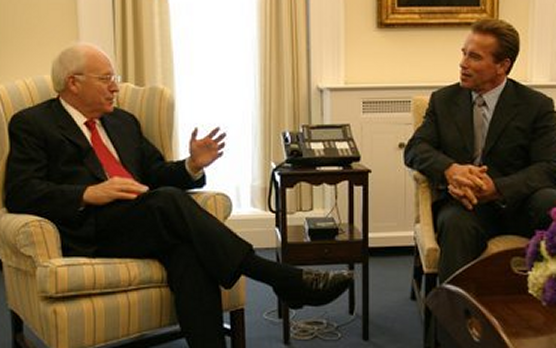 Vice President Dick Cheney meets with Gov. Arnold Schwarzenegger for the first time at the White House.